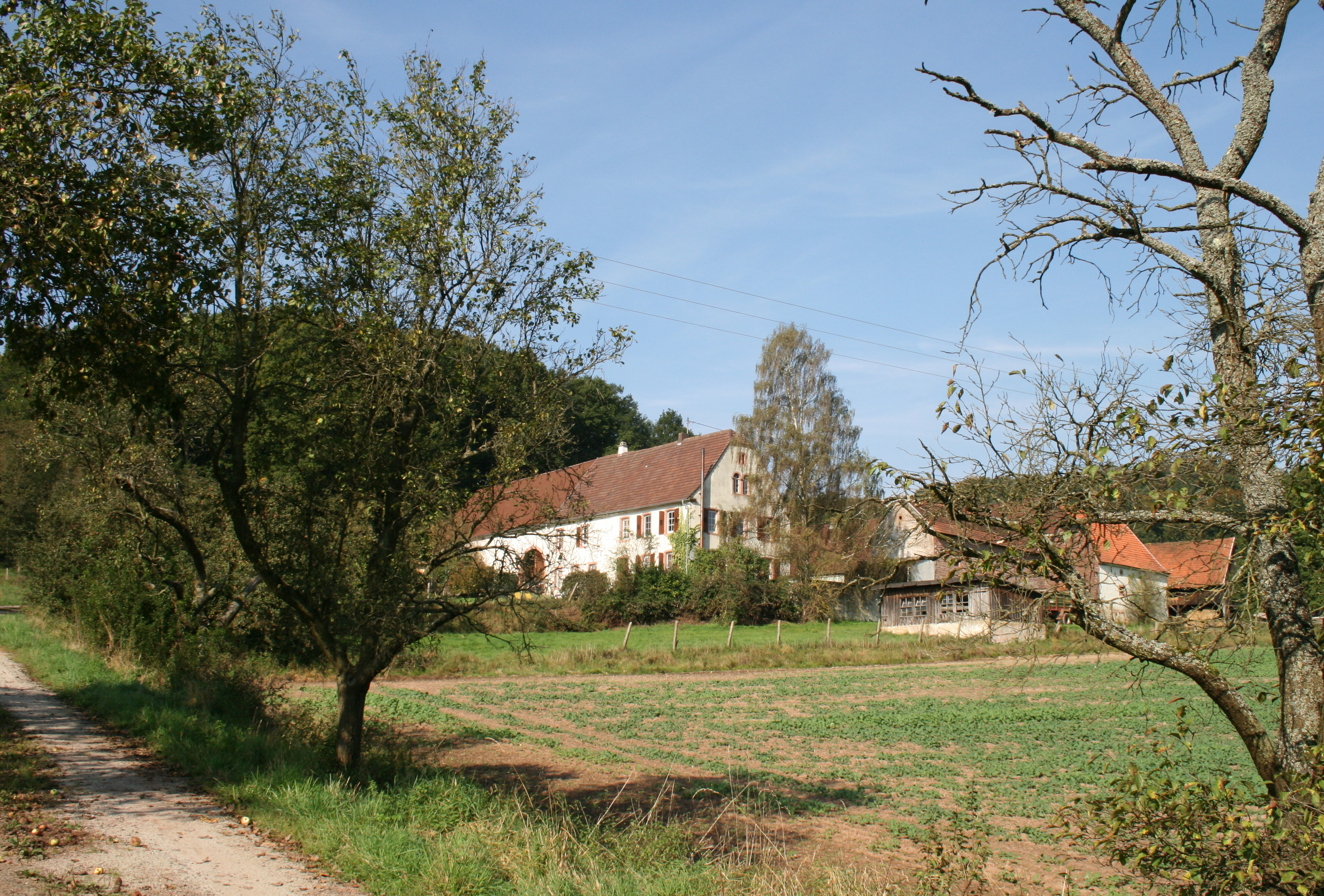 Hahnerhof: Vierseithof, im Wesentlichen aus der Mitte des 19. Jahrhunderts; Wohnhaus und Scheune einfirstartig, langgestreckte Stallung, landwirtschaftlicher Betrieb